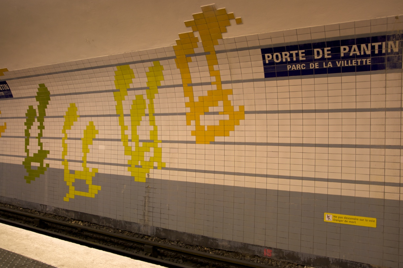 Métro Porte de Pantin station